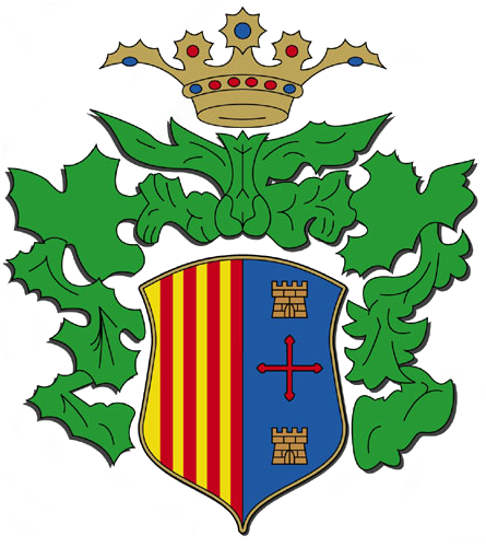 Escudo vectorizado de Villinueva del Río Segura